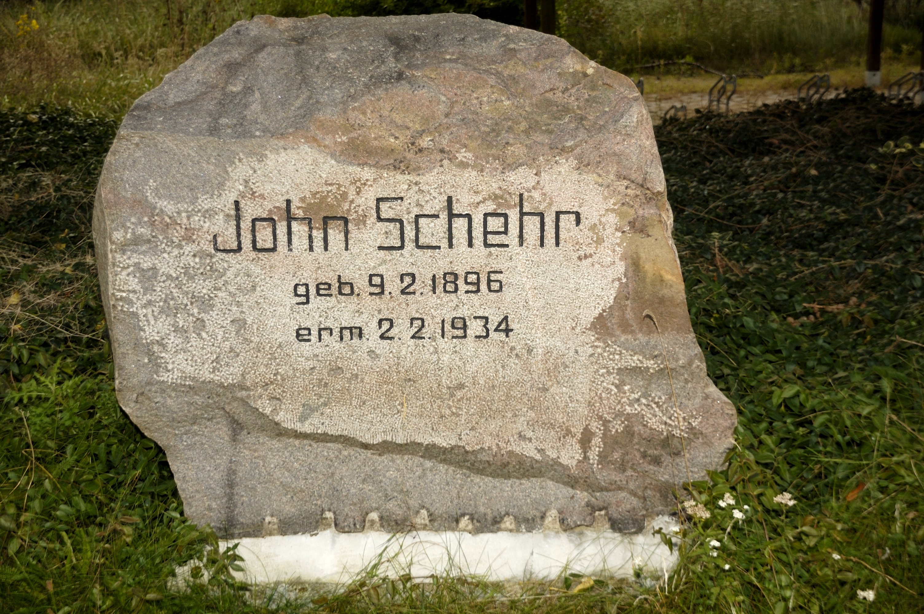 Gedenkstein John Schehr in Rostock-Marienehe